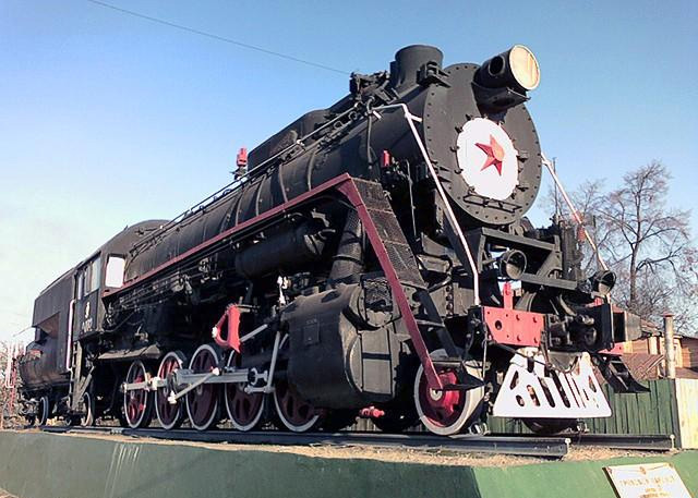 Памятник паровозу, но к сожалению в очень плохом состоянии